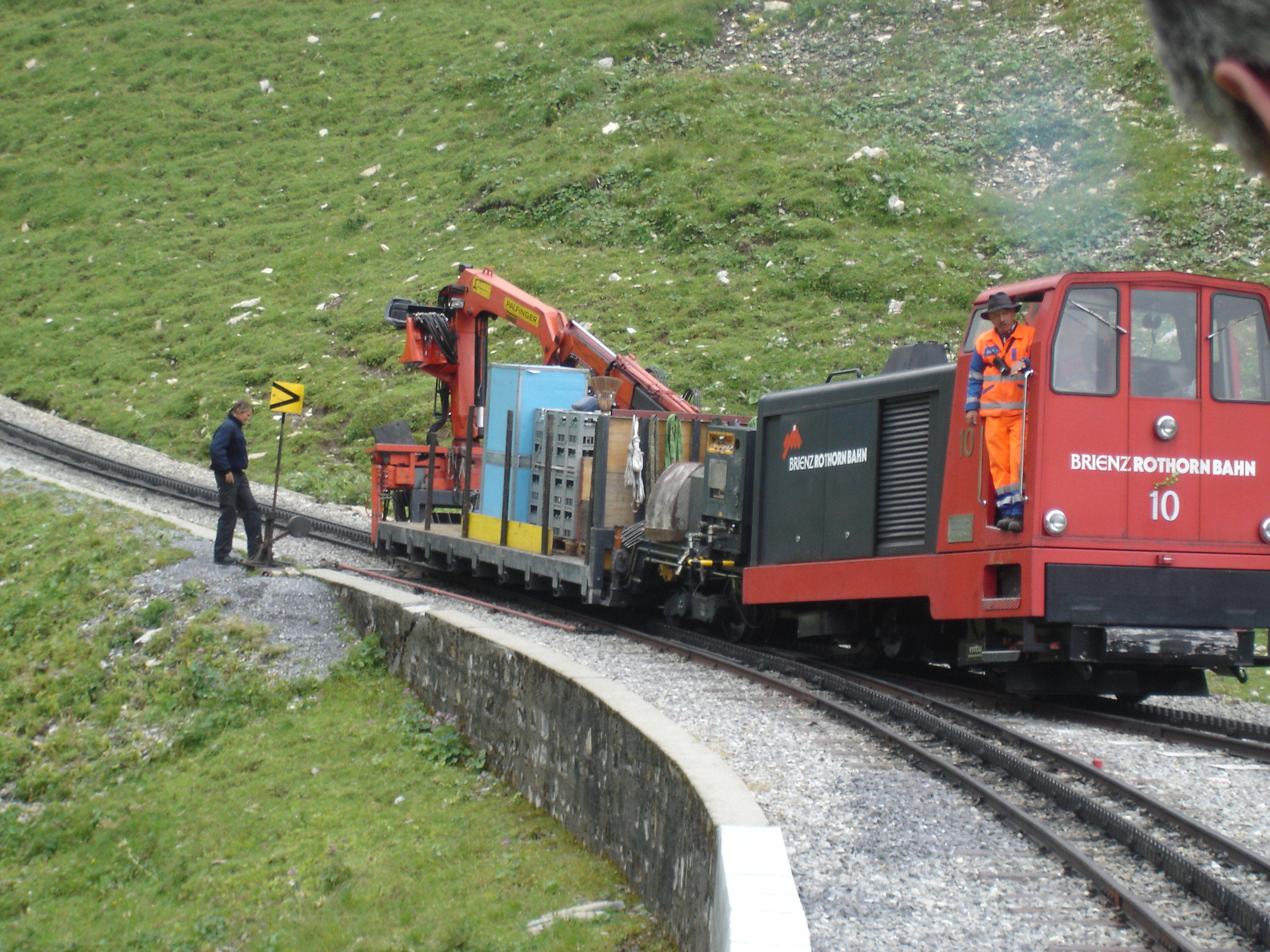 Brienzer Rothorn Bahn Talfahrt Bahndienst mit Diesellok No 10